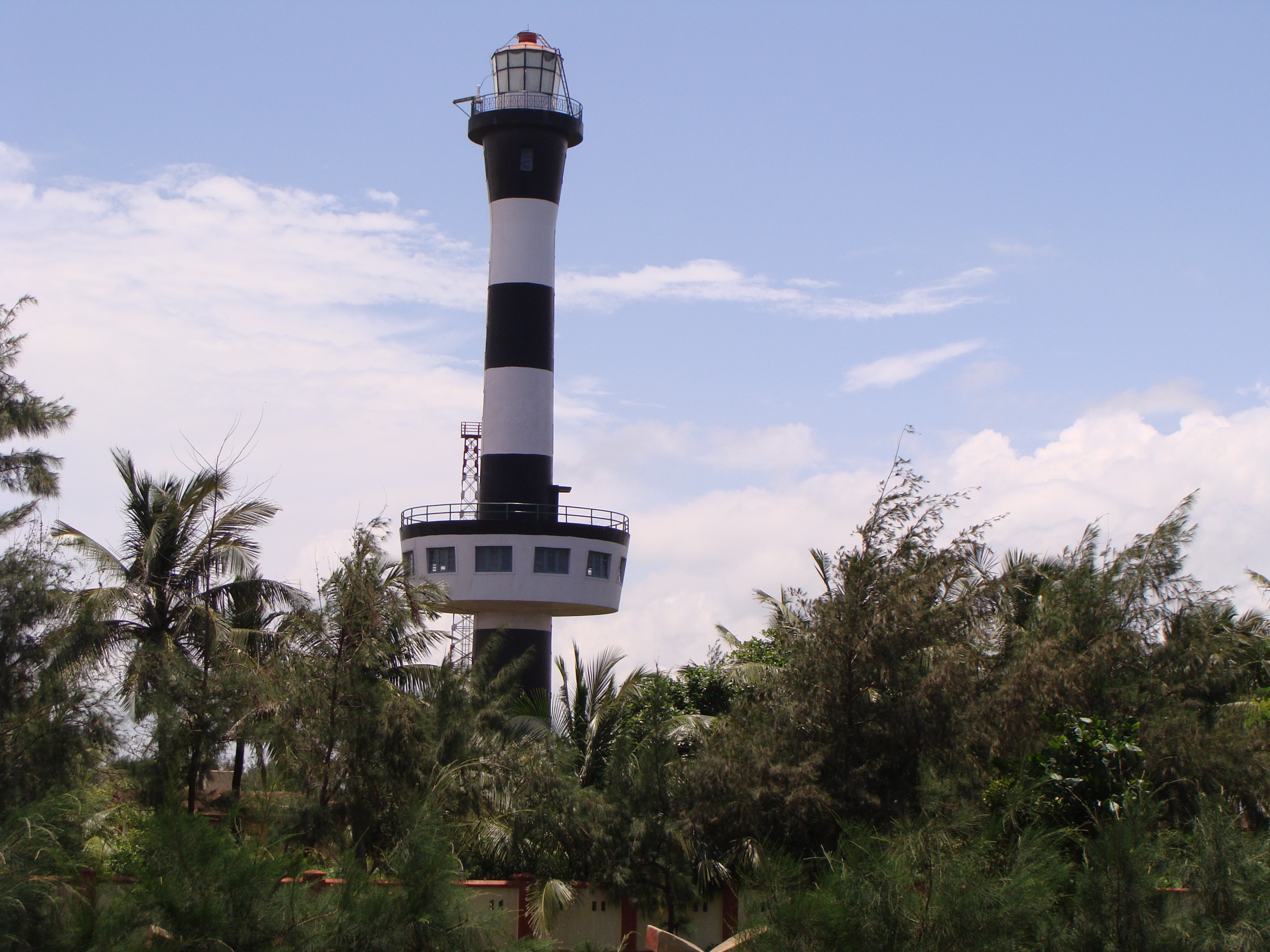 PARADEEP LIGHT HOUSE.